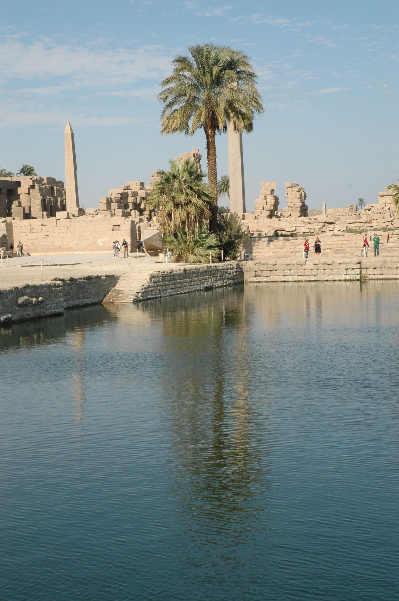 Tempio di Karnak: lago sacro